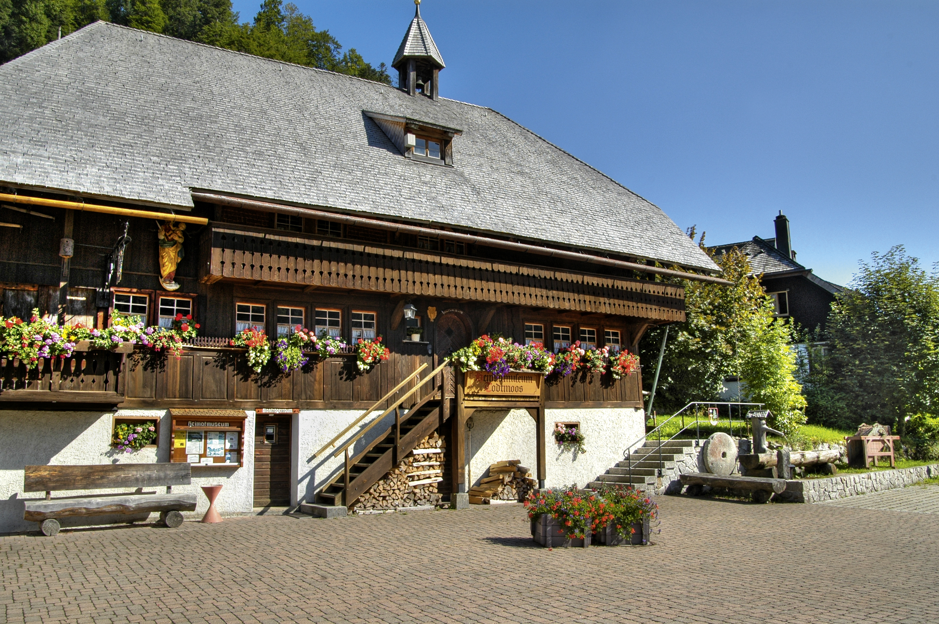 Museum "Heimethus" in Todtmoos